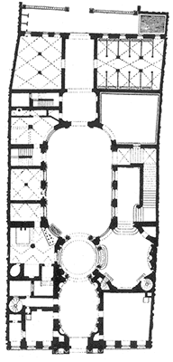 Grundriss des Palais Piosasque de Non ehemals Theatinerstraße 16 in München